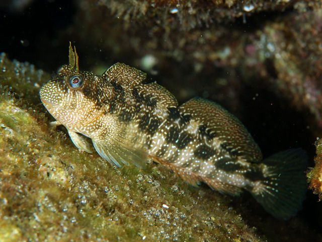 ホシギンポ Entomacrodus stellifer